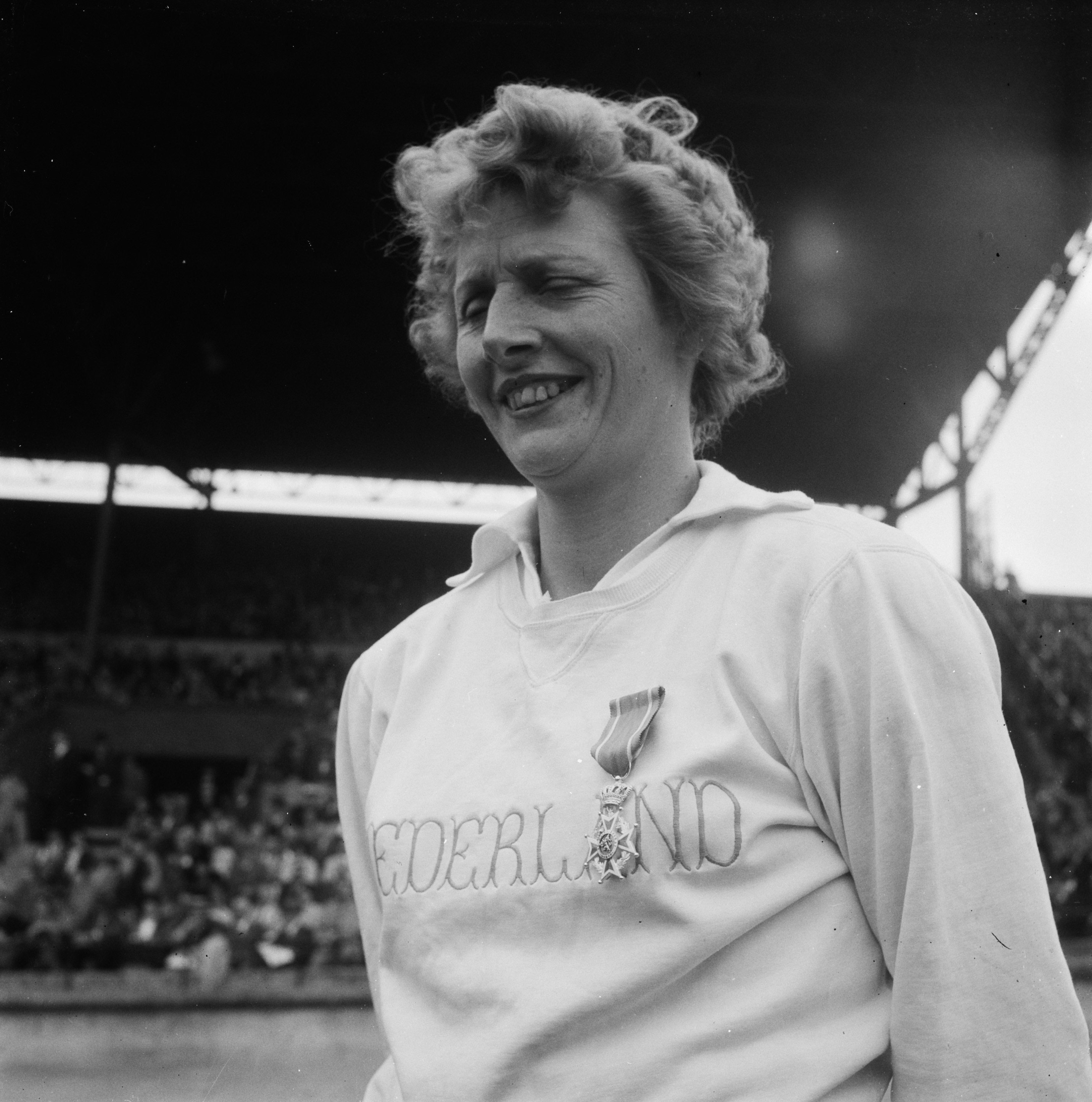 Collectie / Archief : Fotocollectie Anefo Reportage / Serie : [ onbekend ] Beschrijving : Olympische dag in Amsterdam. Fanny Blankers-Koen Datum : 26 juni 1949 Locatie : Amsterdam, Noord-Holland Trefwoorden : atleten, atletiek, portretten, sport Persoonsnaam : Blankers-Koen, Fanny Fotograaf : Noske, J.D. / Anefo Auteursrechthebbende : Nationaal Archief Materiaalsoort : Negatief (zwart/wit) Nummer archiefinventaris : bekijk toegang 2.24.01.03 Bestanddeelnummer : 903-4519